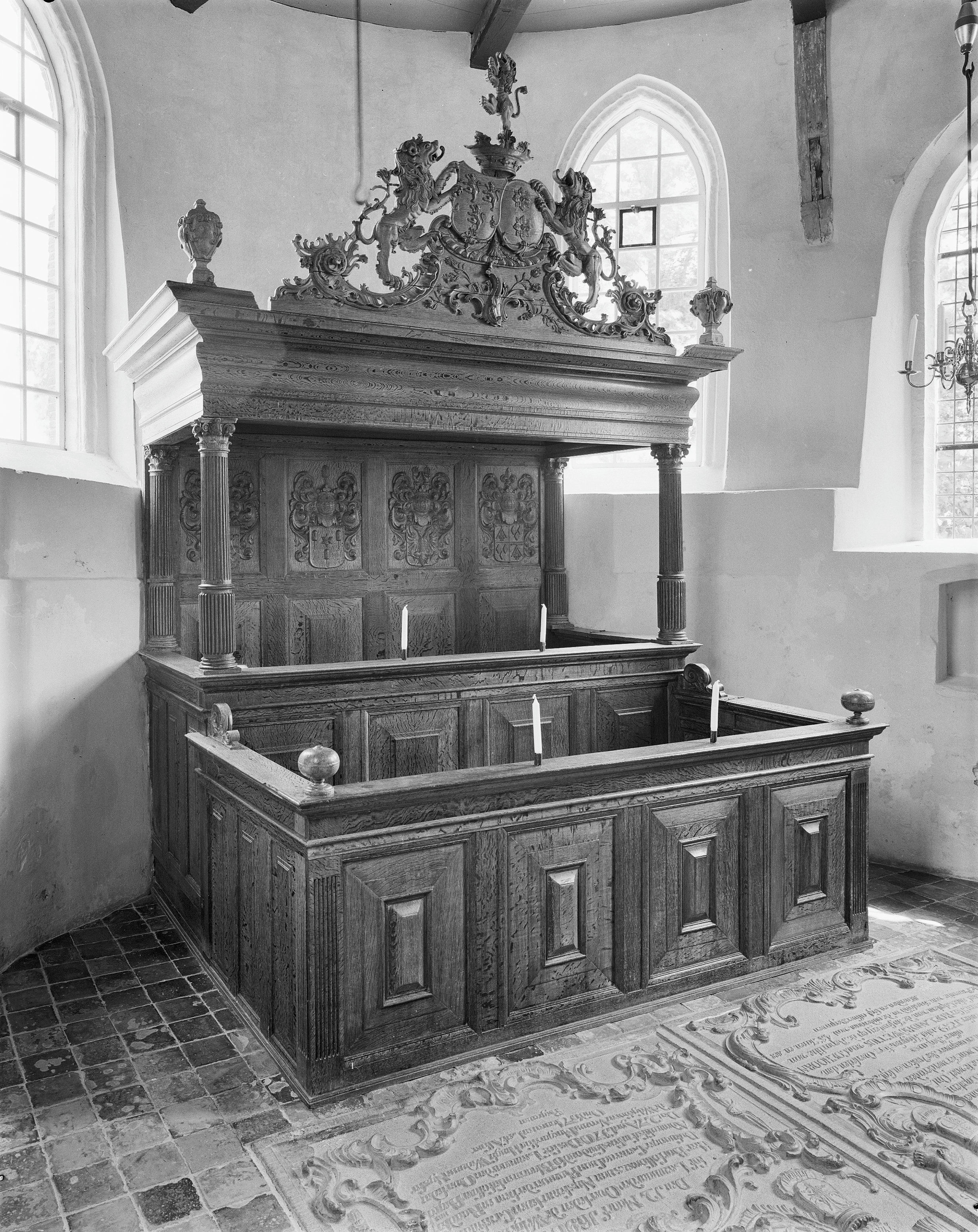 Nederlandse Hervormde Kerk: Interieur, familiebank